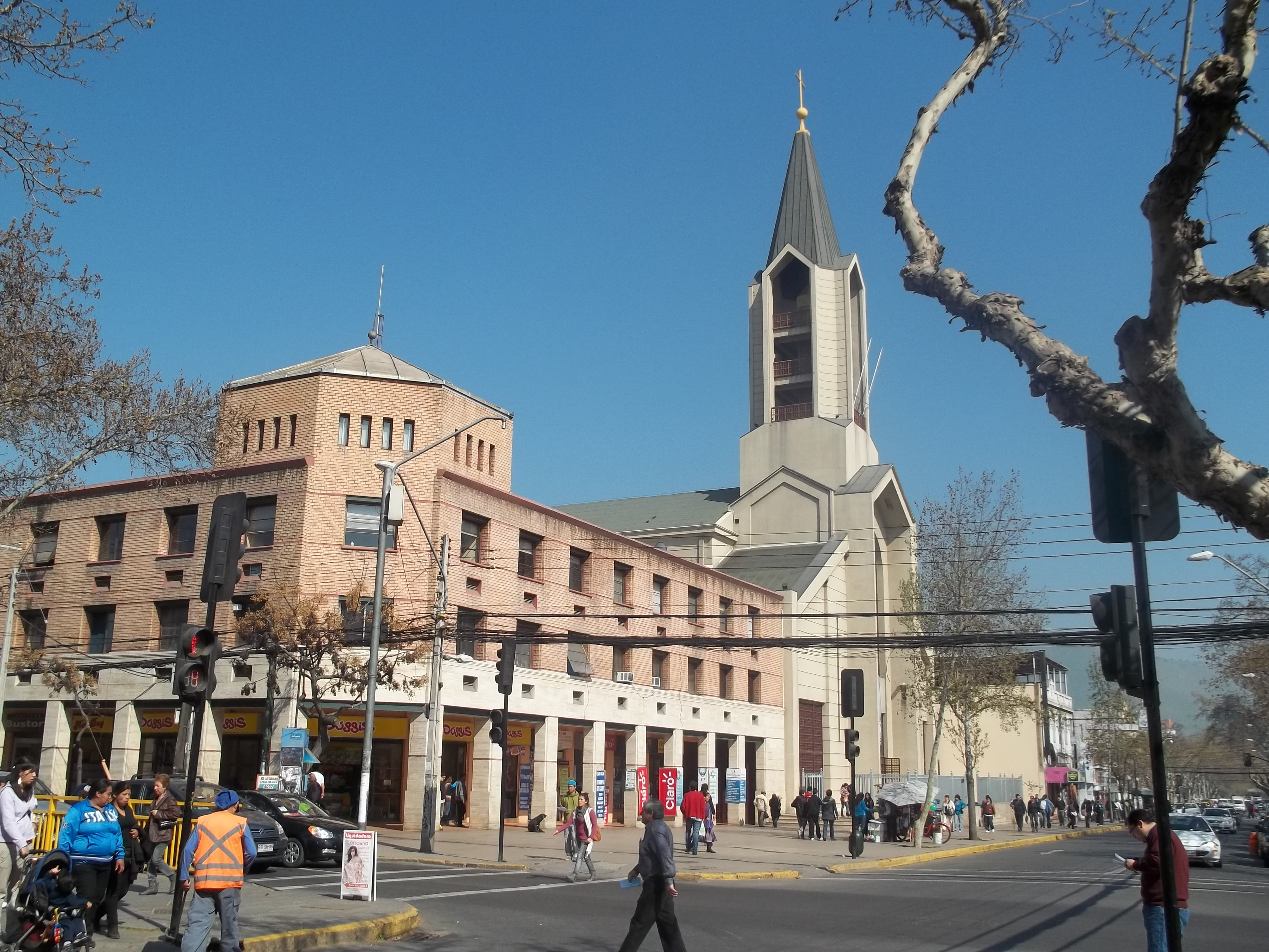 catedral